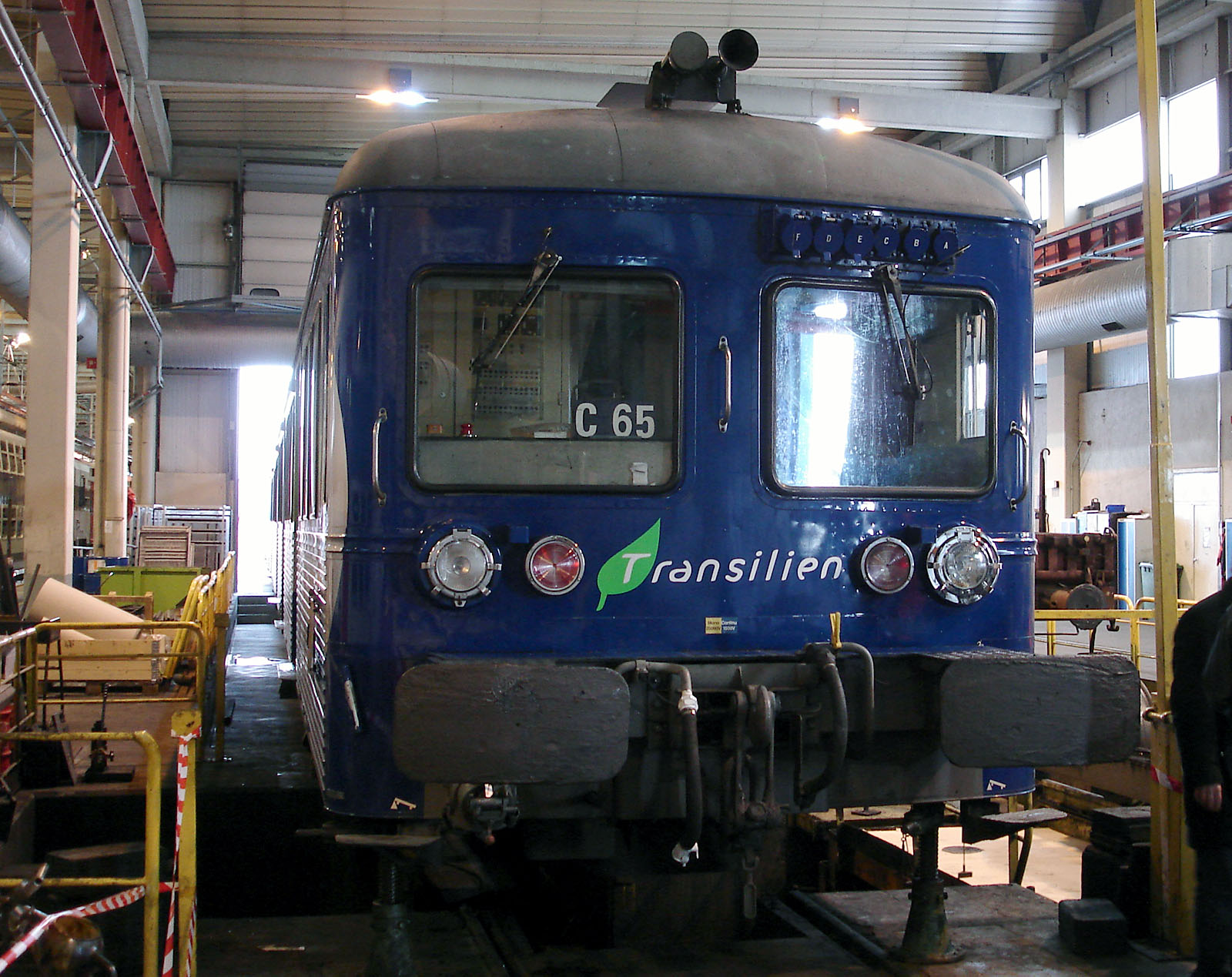 Rame inox de banlieue (RIB) au technicentre Paris Nord-Joncherolles, Villetaneuse, Seine-Saint-Denis, France.